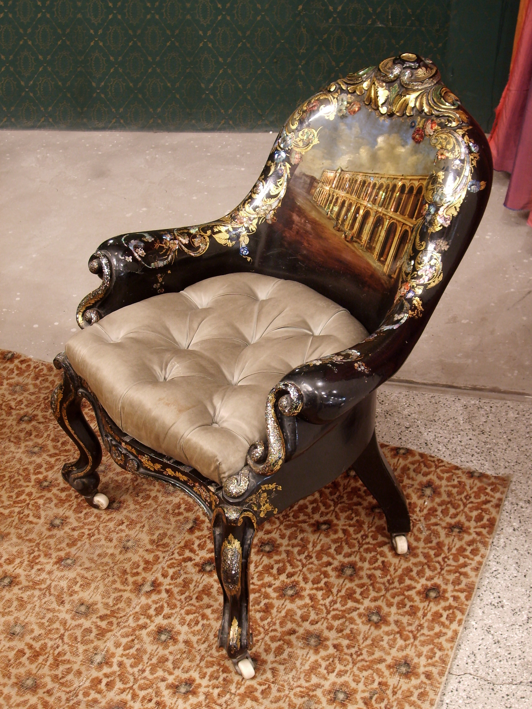 Silla decorada con papel maché y nácar, con motivos que representan diversos monumentos del Santiago de Chile Antiguo. Época del Segundo Imperio. Perteneció a la Señora Teresa Blanco Gana de Echeverría. Forma parte de la colección del Museo del Carmen de Maipú, en Santiago de Chile.